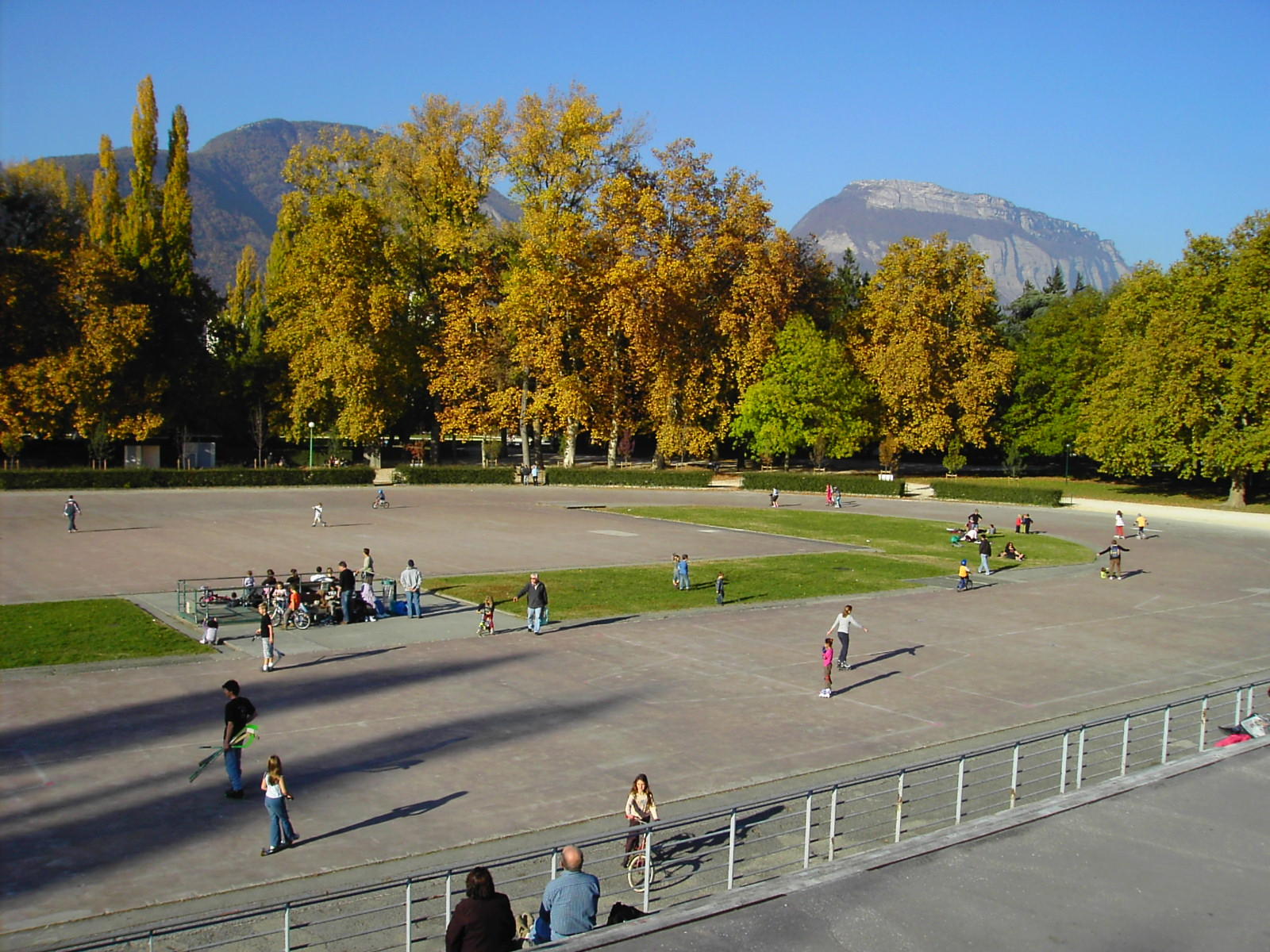 parc Paul Mistral